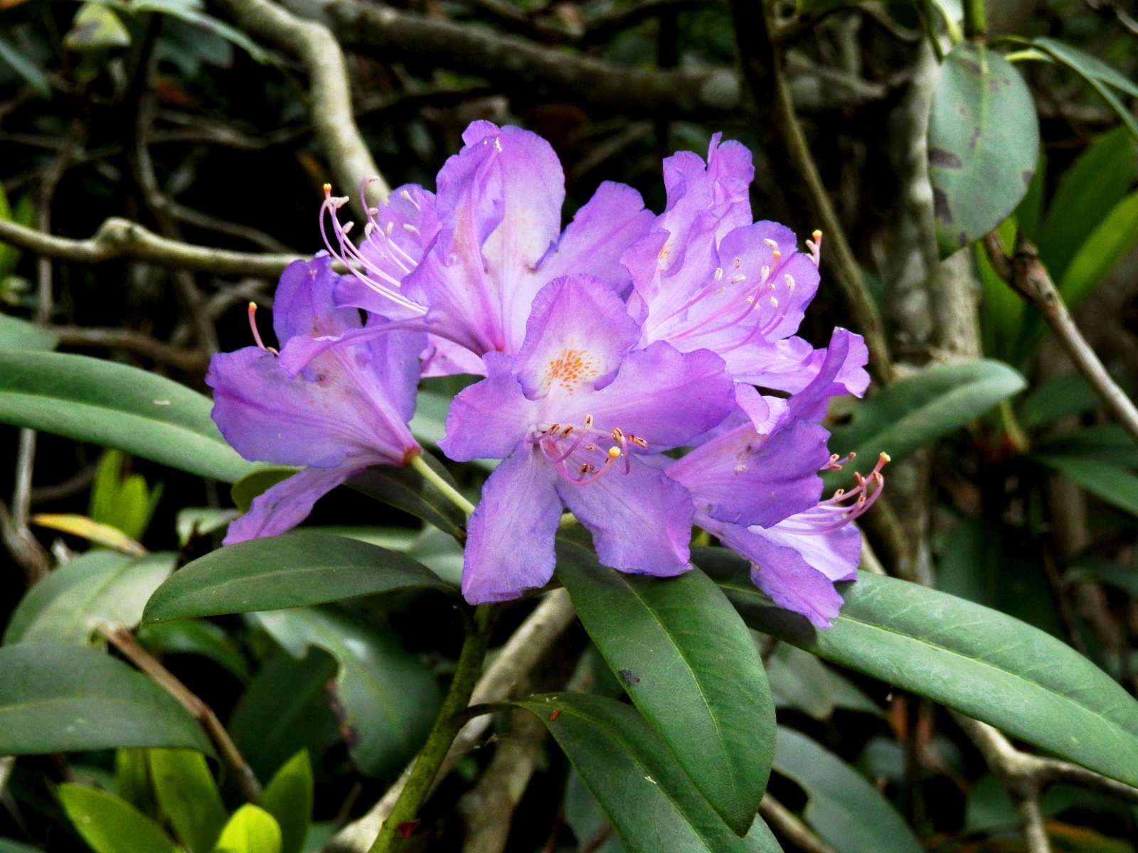 Странджа, Странджанска зеленика в защитена местност Марина река